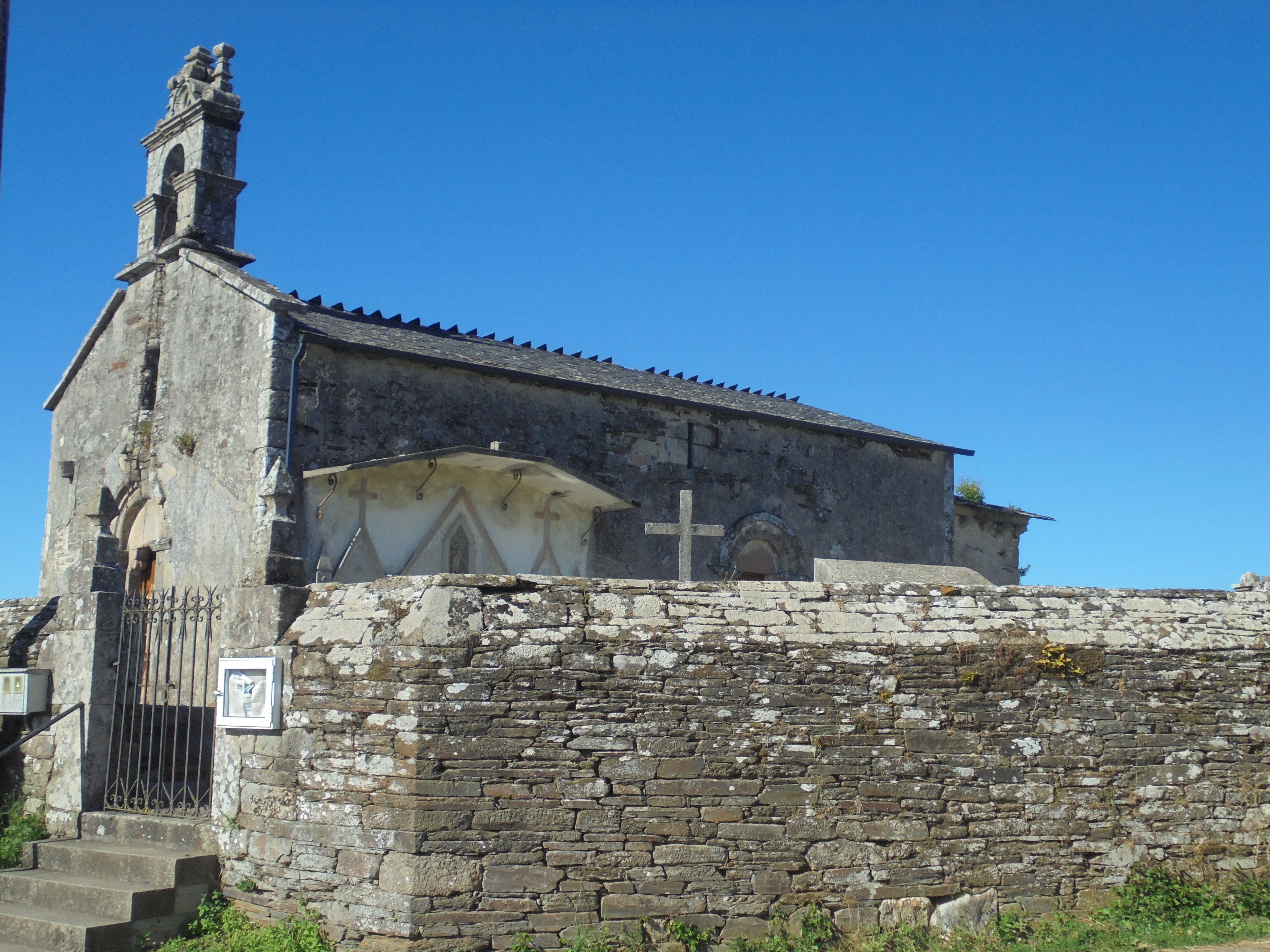 Igrexa parroquial de Santalla do Alto ( O Corgo)